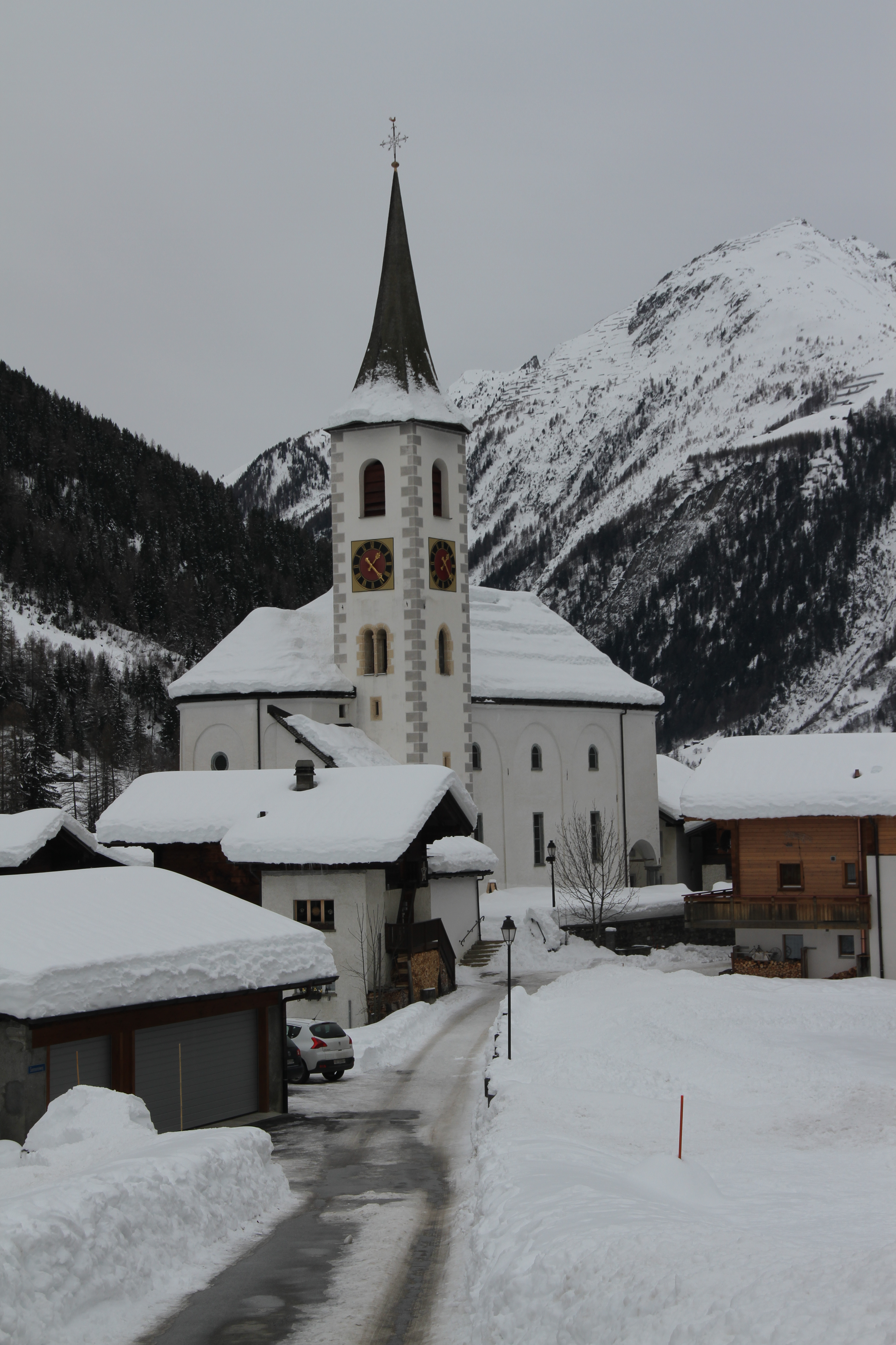 Kirche in Kippel